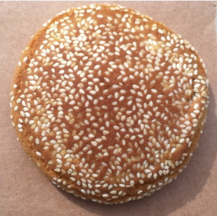 中文（香港）: 一個太谷餅